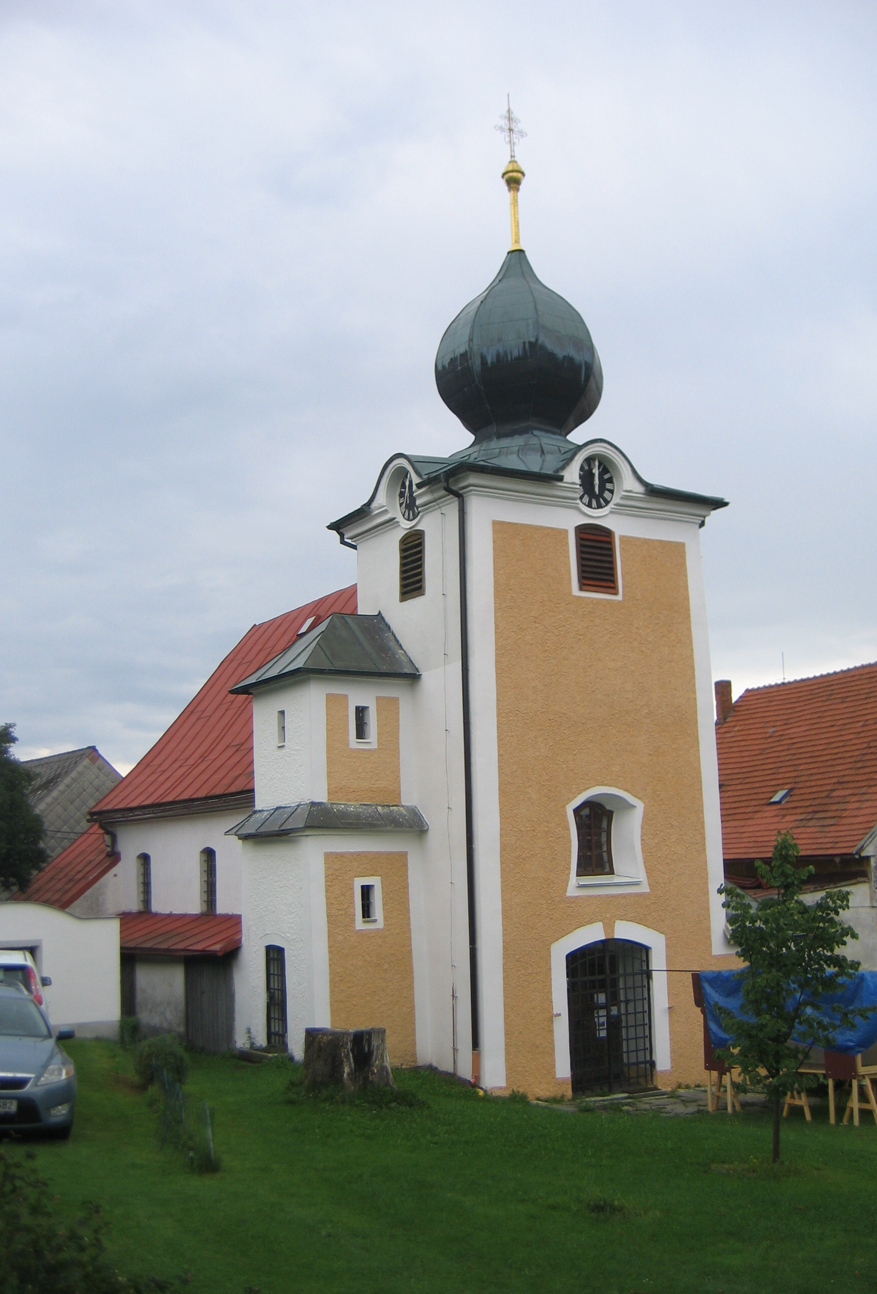 Hory Matky Boží (okr. Klatovy), kostel Jména Panny Marie od severozápadu.